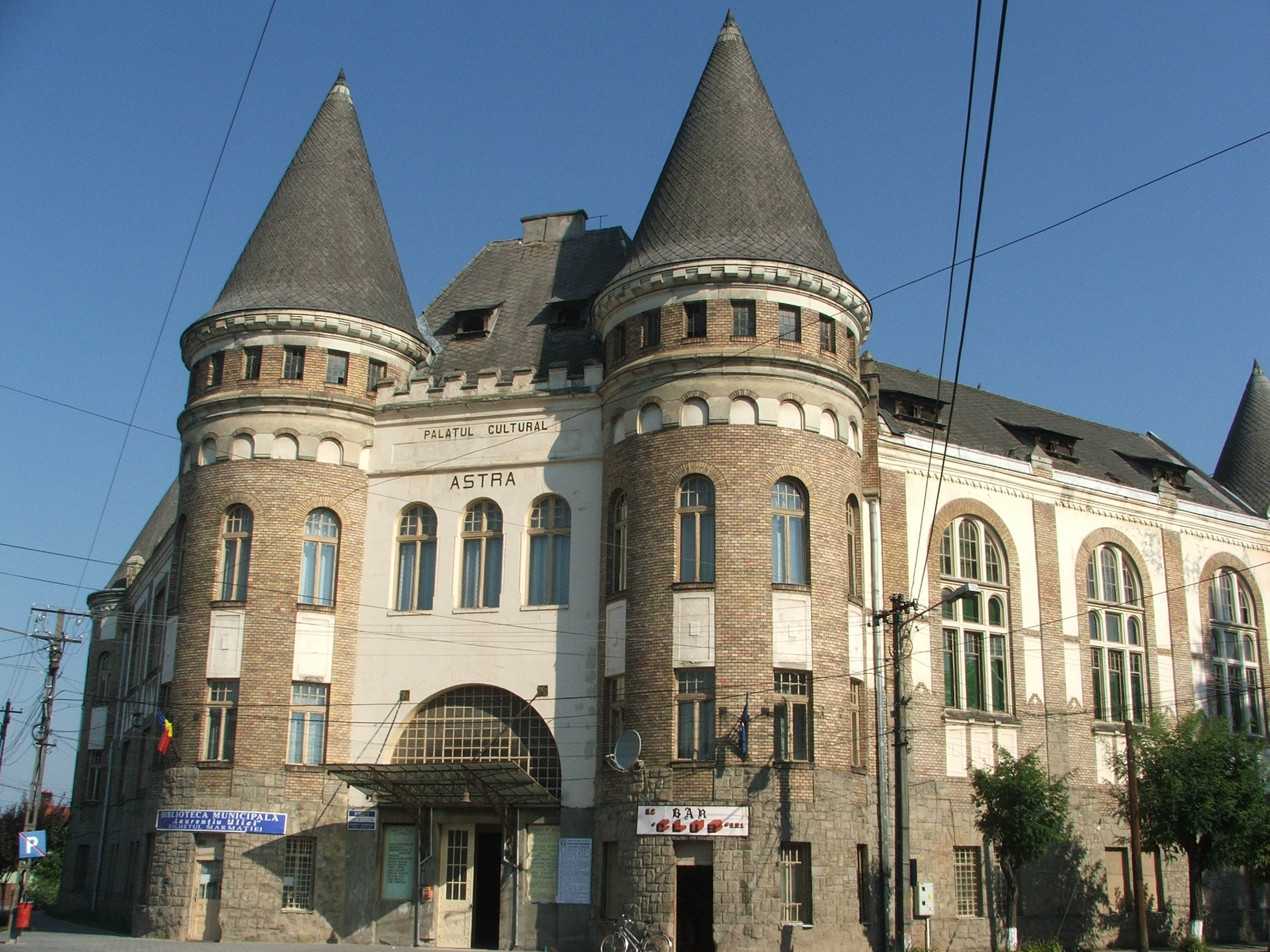 Centrul istoric al orașului Sighetu Marmației - Palatul Culturii ASTRA